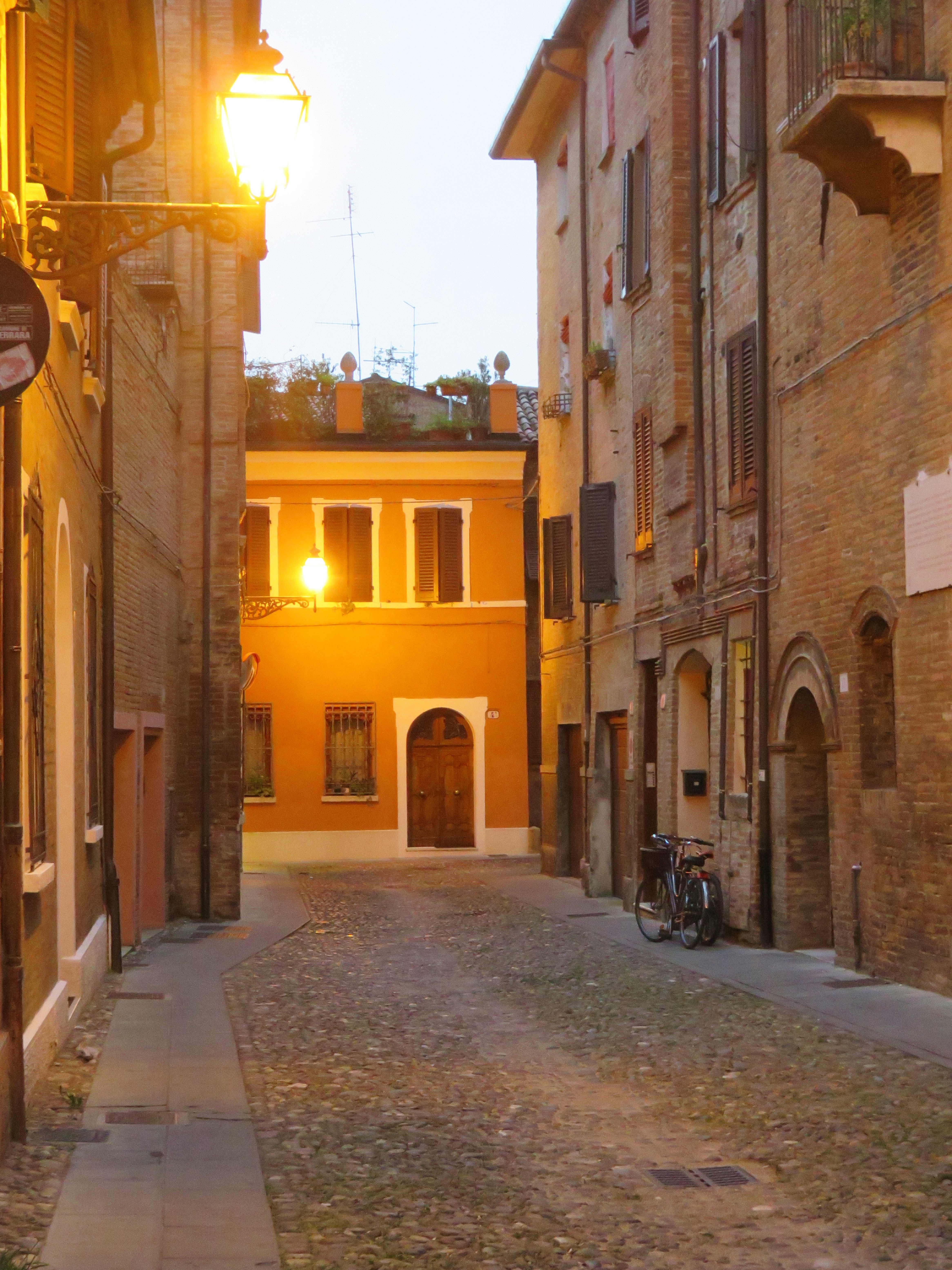 via del Carbone - Parte dove la strada forma un angolo di 90°